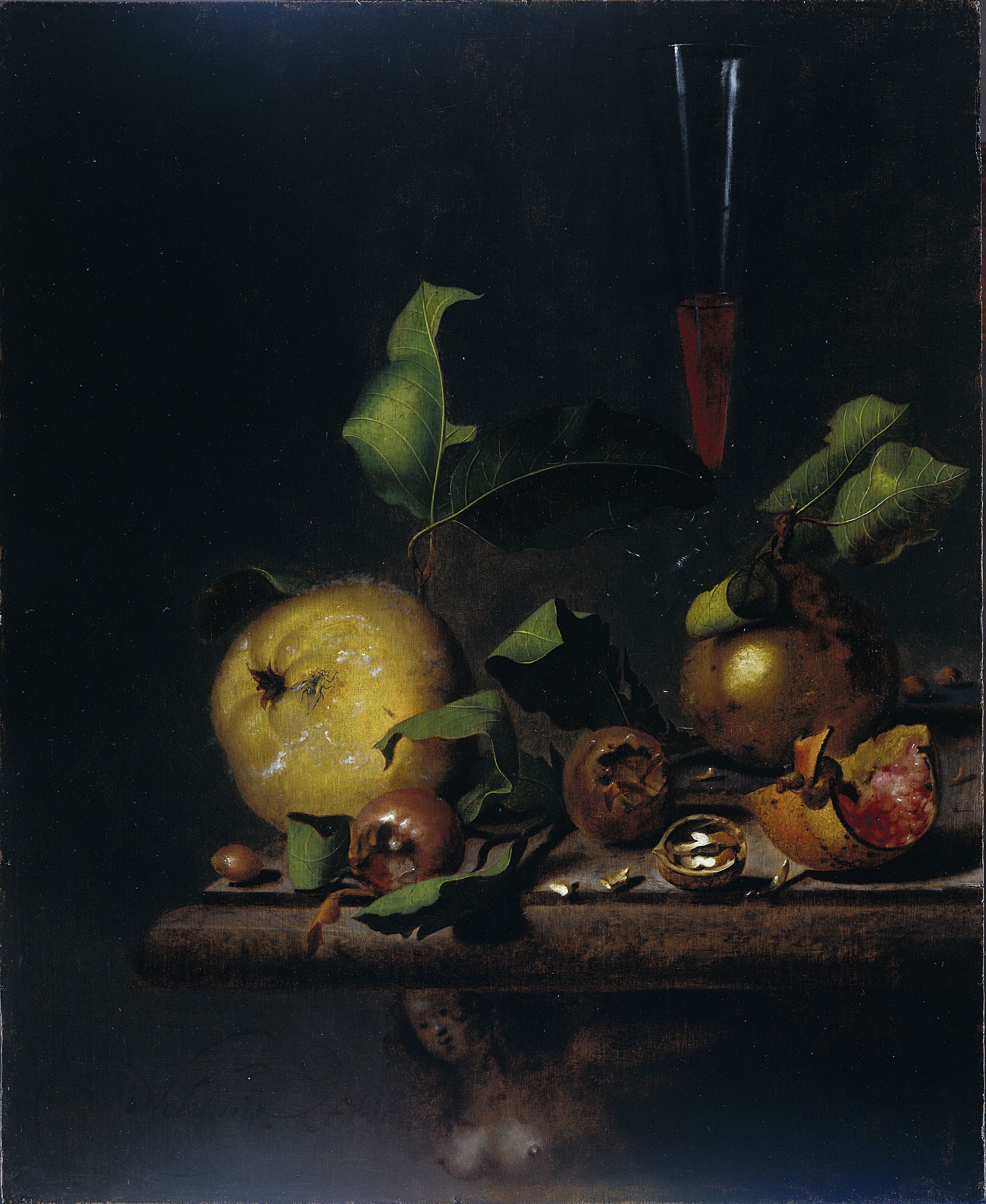 Stilleven met peren, mispels, een stuk van een granaatappel, noten en een hoog glas. Uitgestald op de hoek van een tafel gedecoreerd met de gesneden figuur van een naakte vrouw.